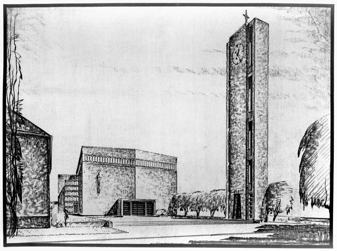 St.Elisabeth Hanau - Zeichnung des Architekten Joahnnes Reuter aus Kassel zur Baubeschreibung 1963